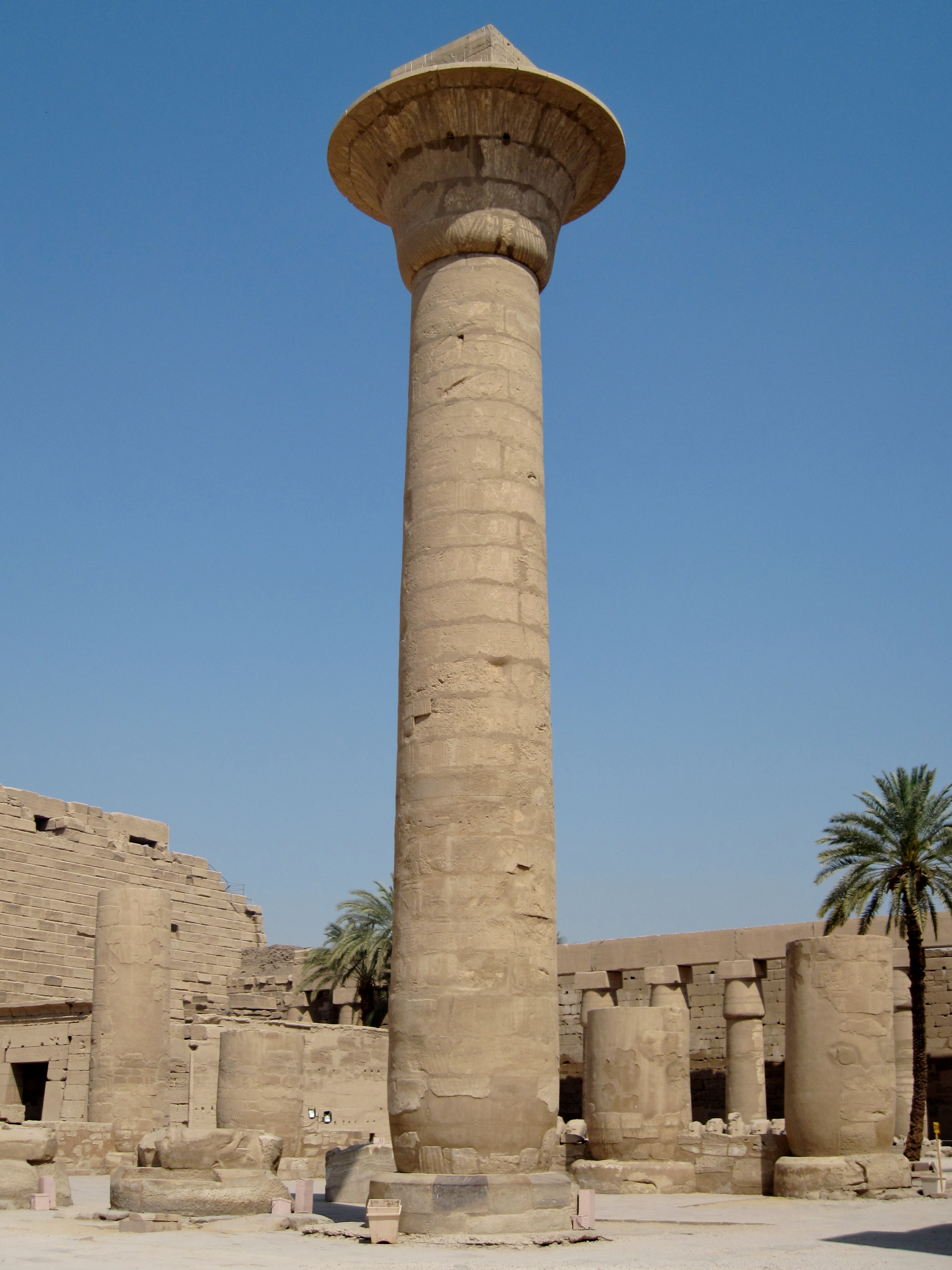 Verbliebene Säule vom Kiosk des Taharka (Taharqa) im Vorhof des Tempels von Karnak, nördlich von Luxor, Ägypten